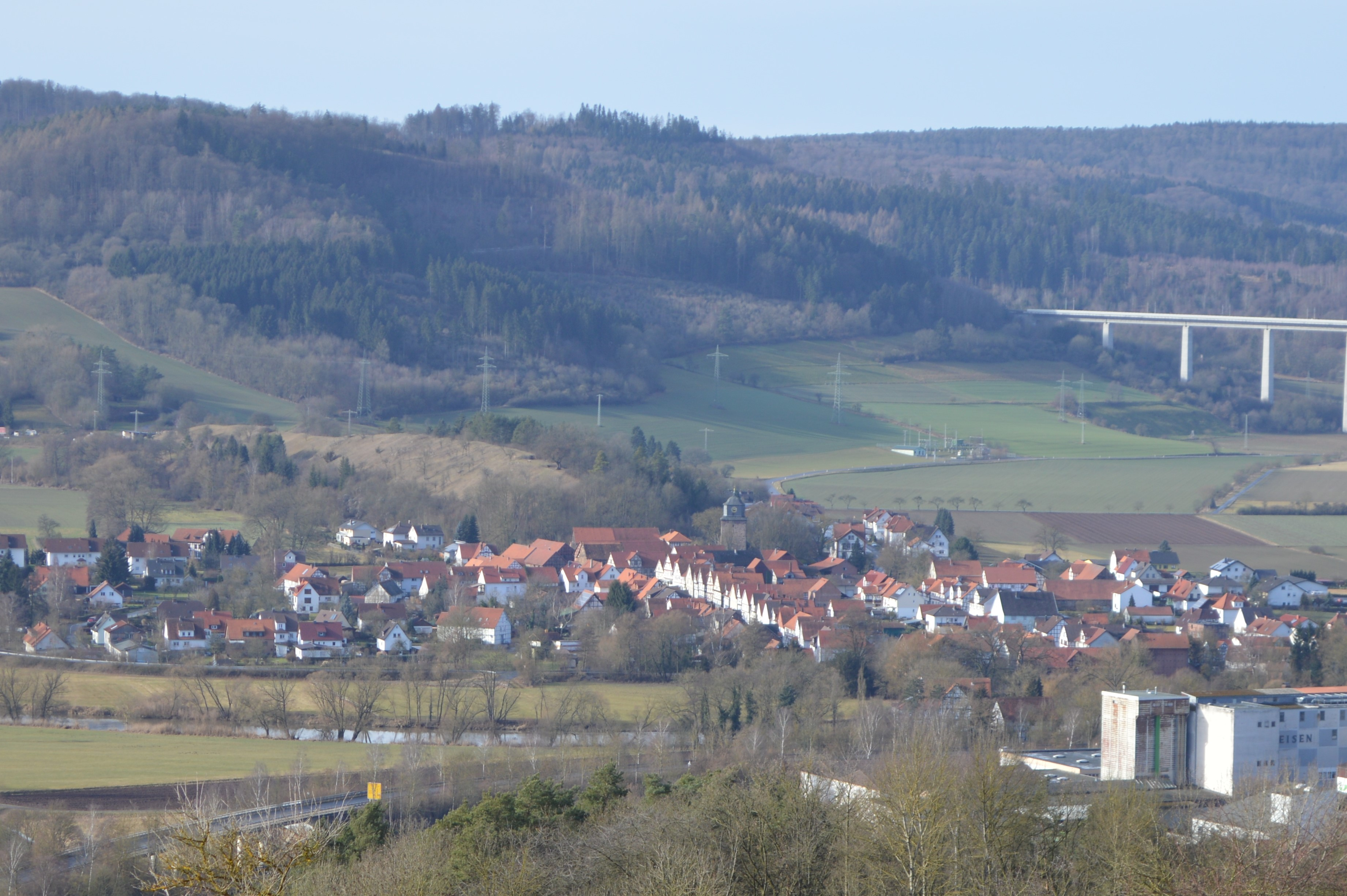 Neumorschen Frühjahr 2017